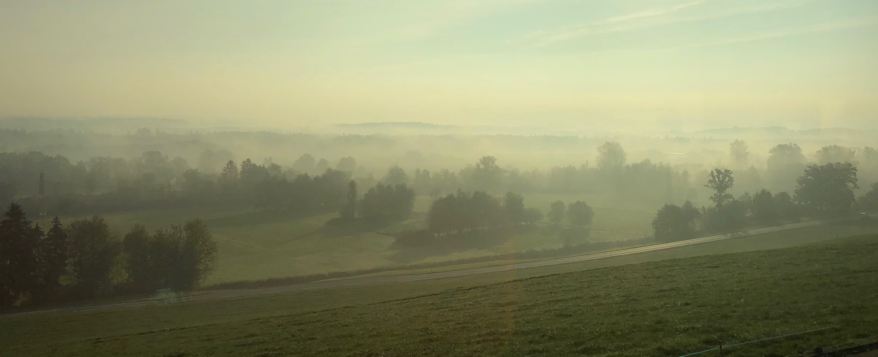 de: Freiamt südl. von Mühlau